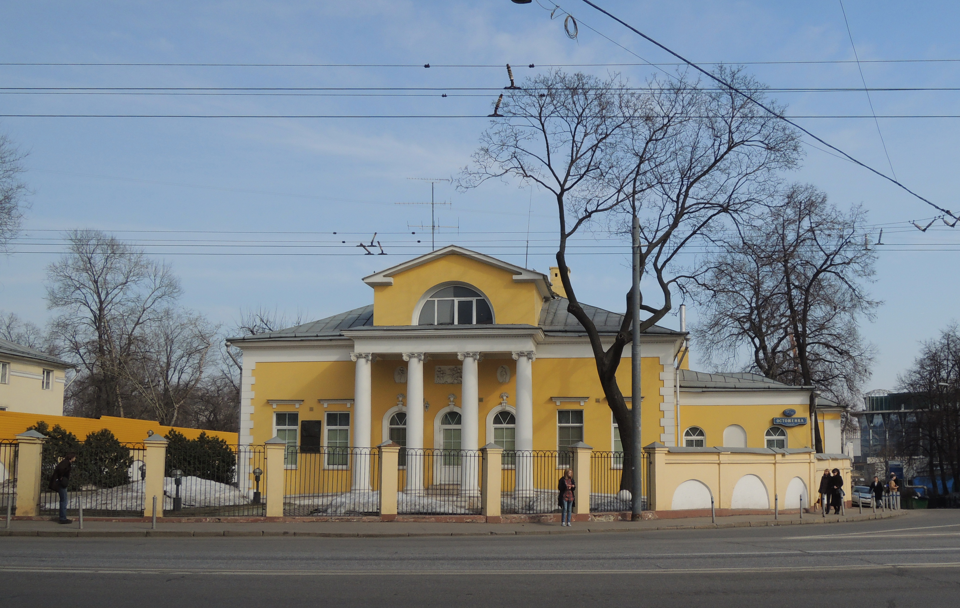 Главный дом усадьбы Н. О. Косыревой - Абрикосовы